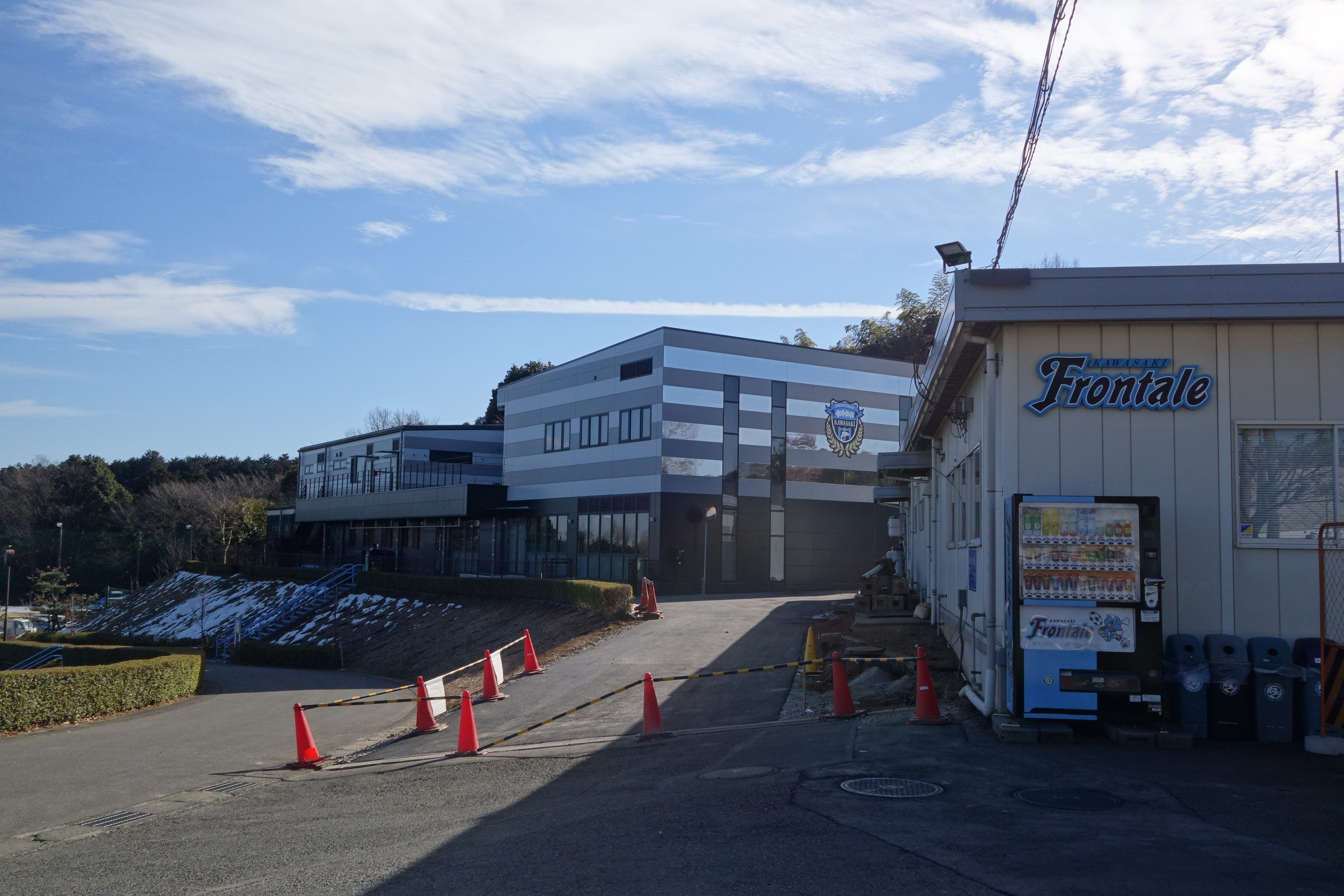 川崎フロンターレ・新クラブハウス（川崎市麻生区） 2016年1月27日撮影